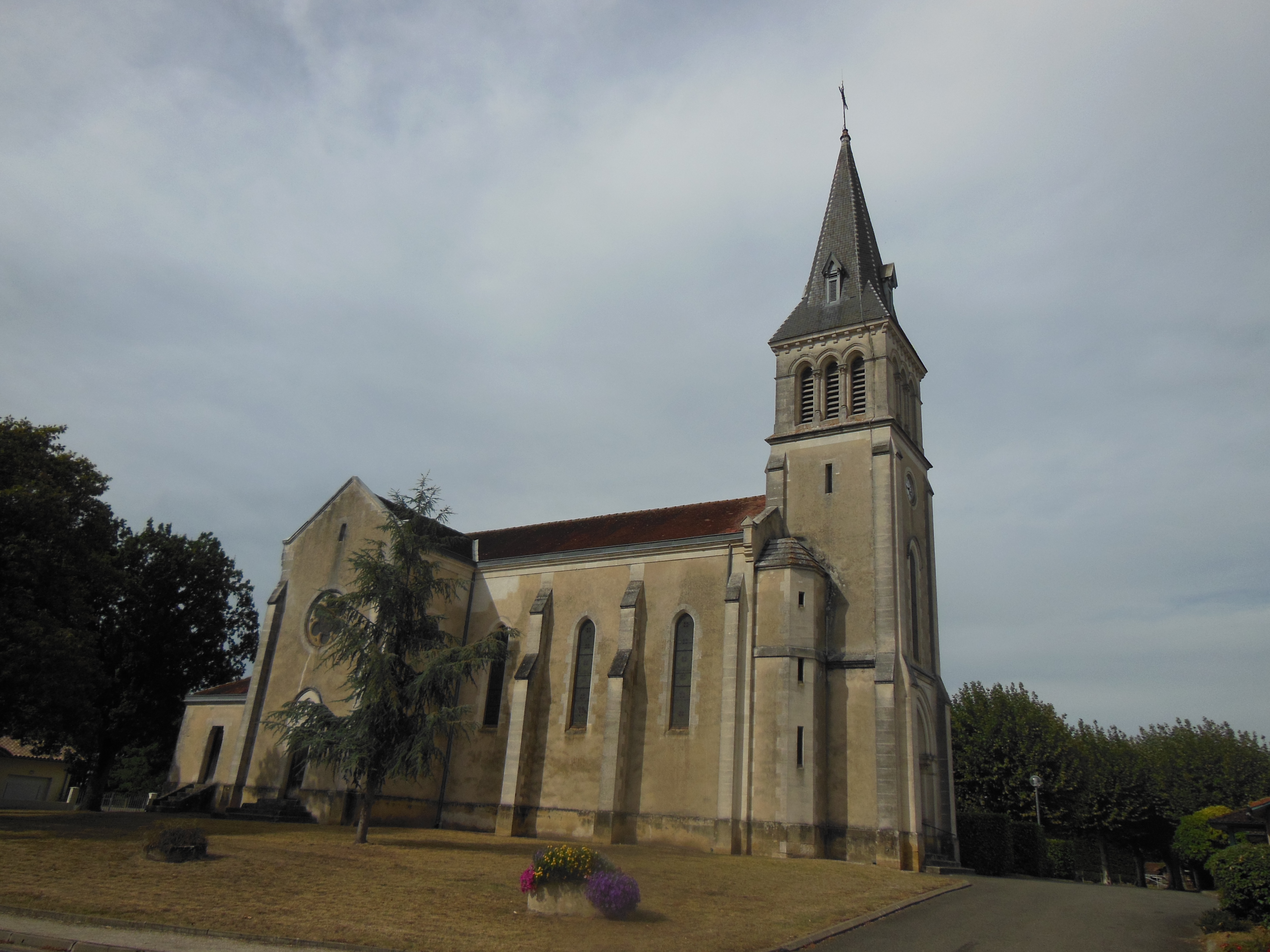 Eglise de Saint-Gor, dans le département français des Landes